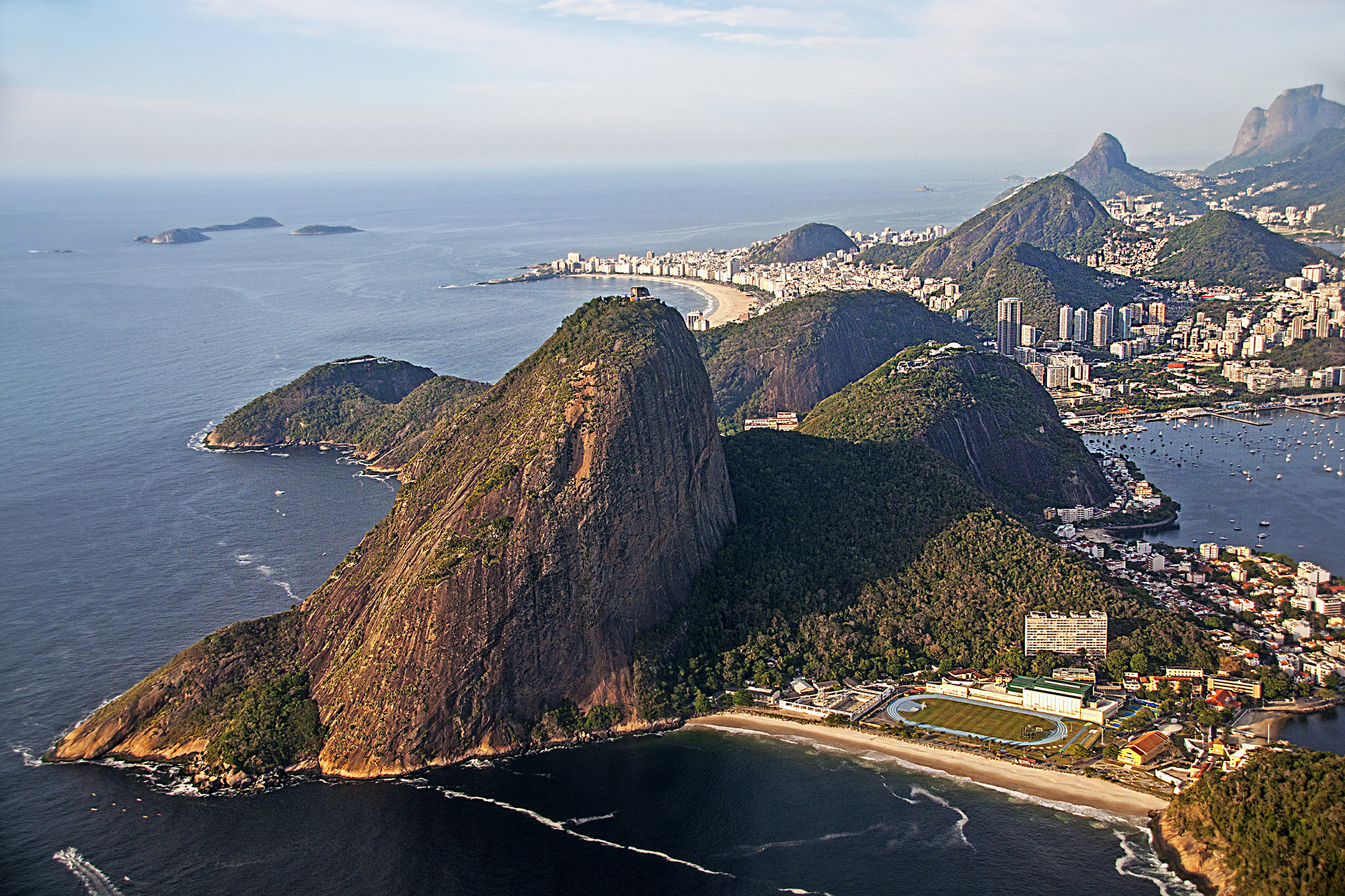 Uma vista aérea do Pão-de-Açúcar